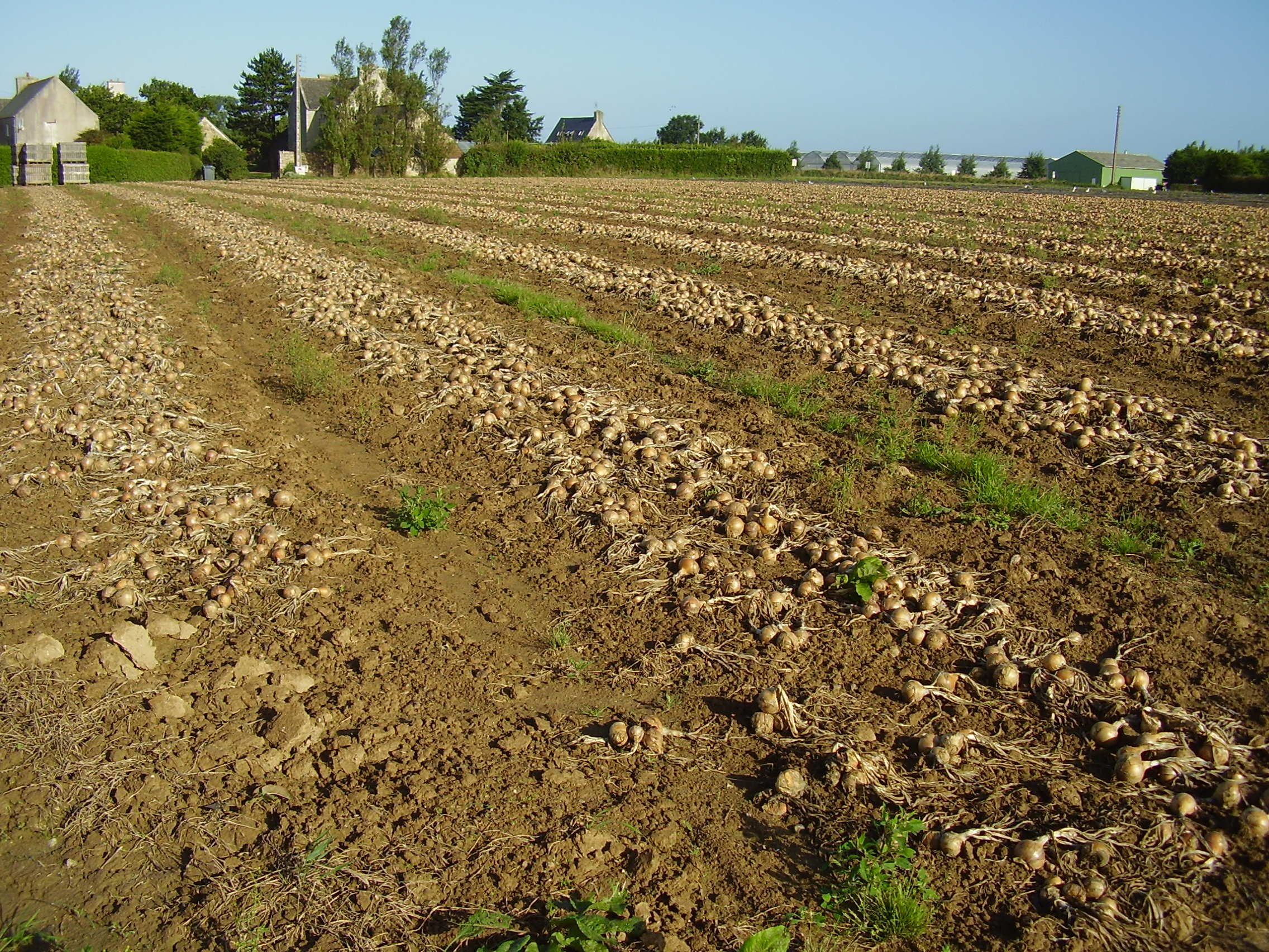 Zwiebelfeld